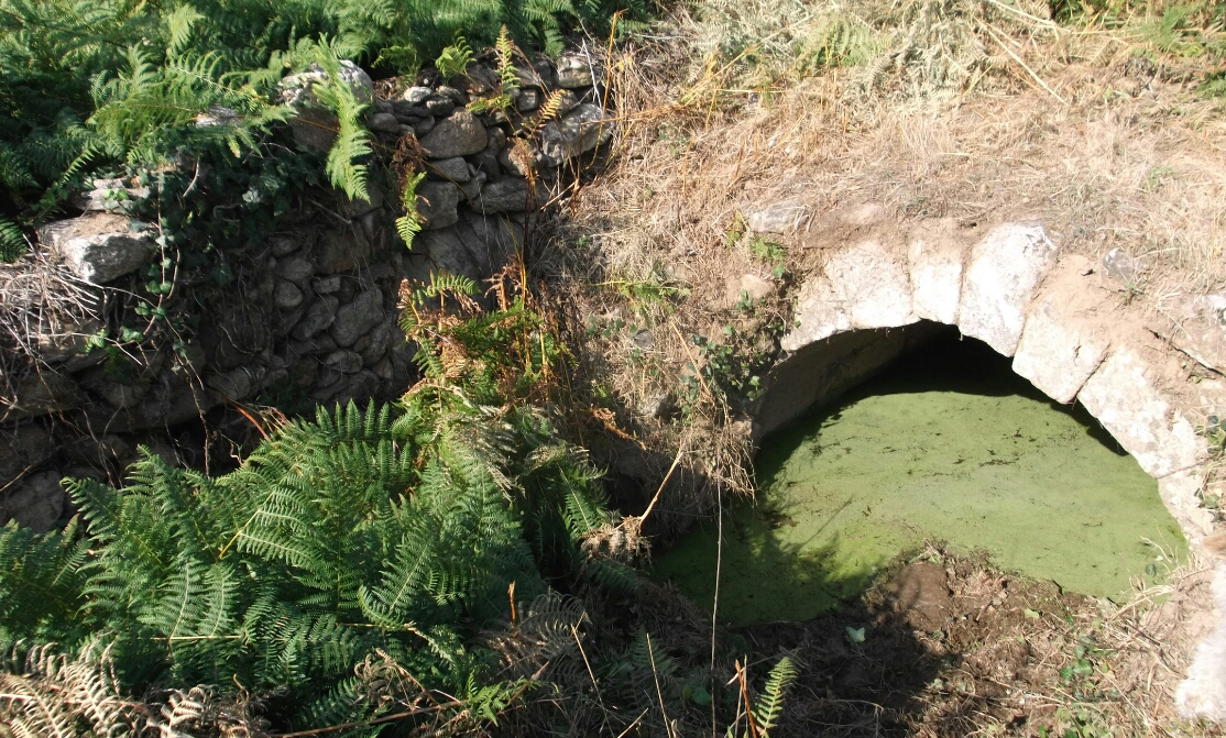 "Fonte dos Cótimos Velhos” Fotografia de Manuel Santos